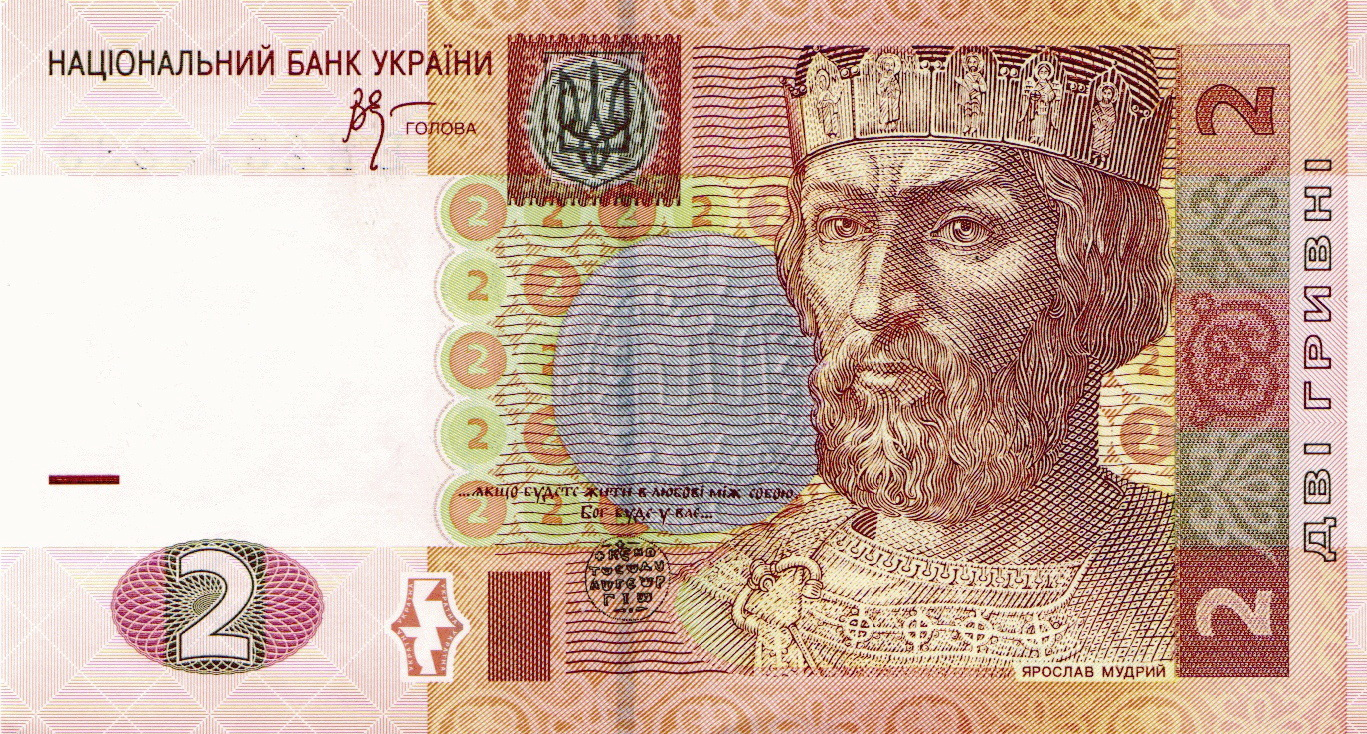 2 гривны 2005 г. выпуска, образца 2004 г. Аверс.